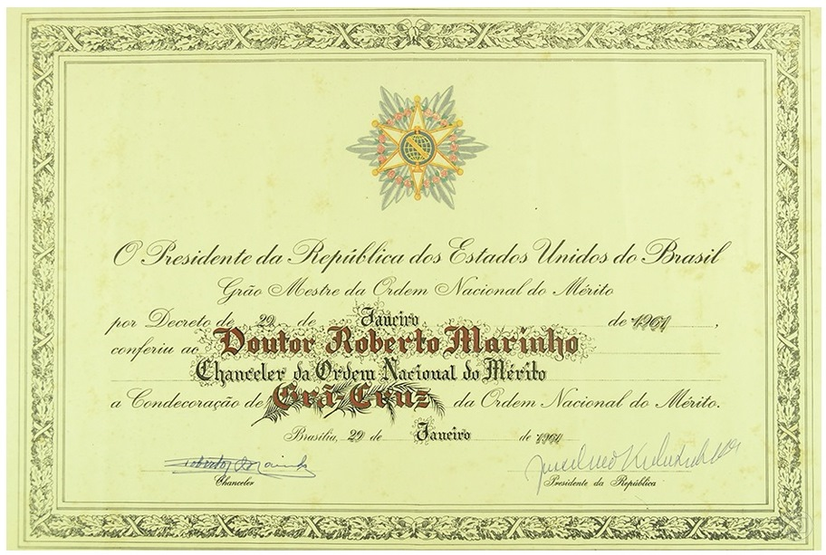 Diploma da Ordem Nacional do Mérito do Brasil que o governo brasileiro conferiu ao senhor Roberto Marinho.